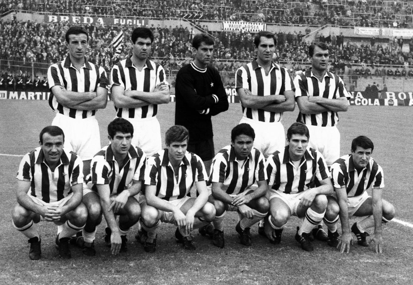 Una formazione della Juventus nella stagione 1966-67.